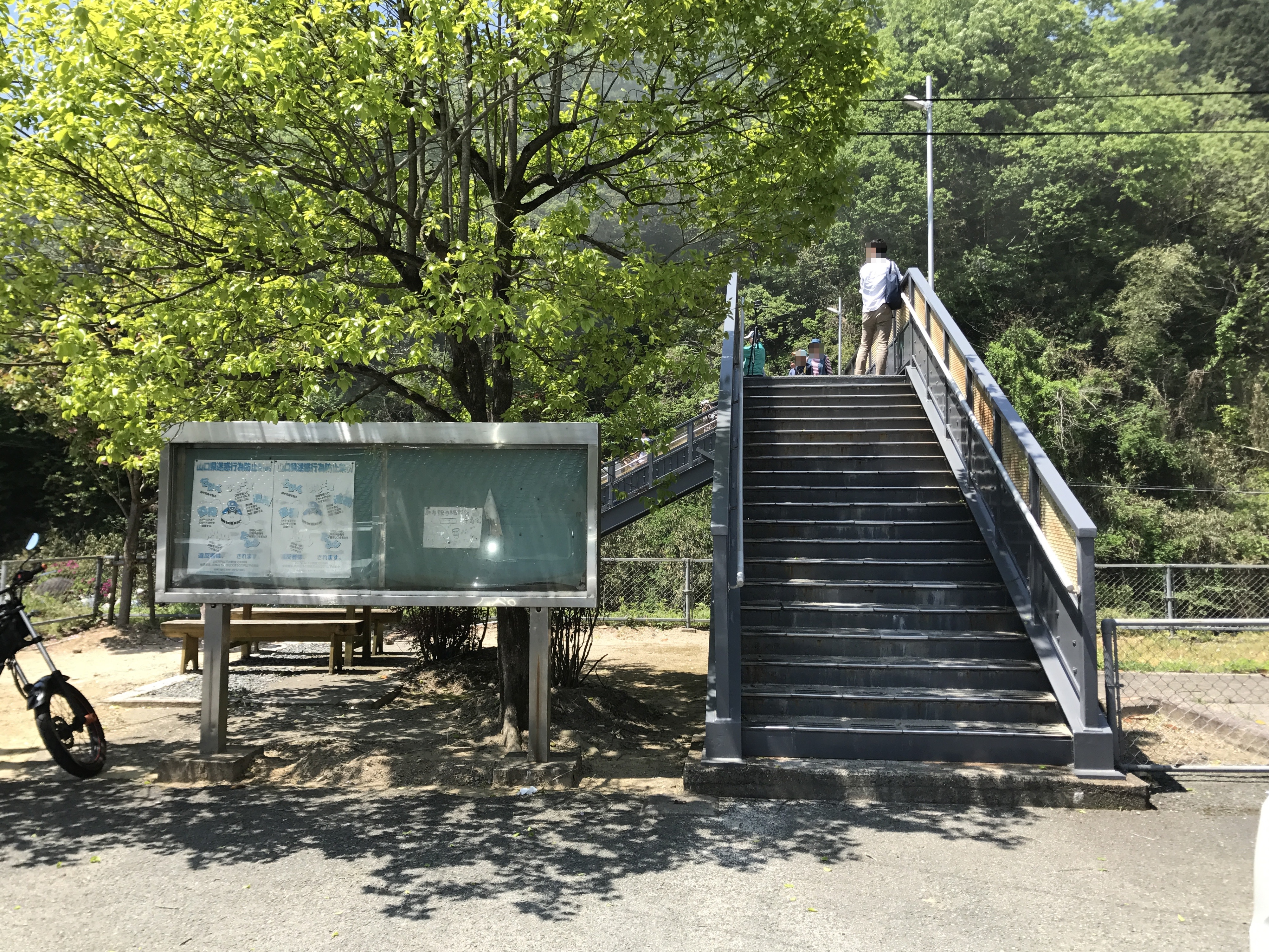 仁保駅の入り口